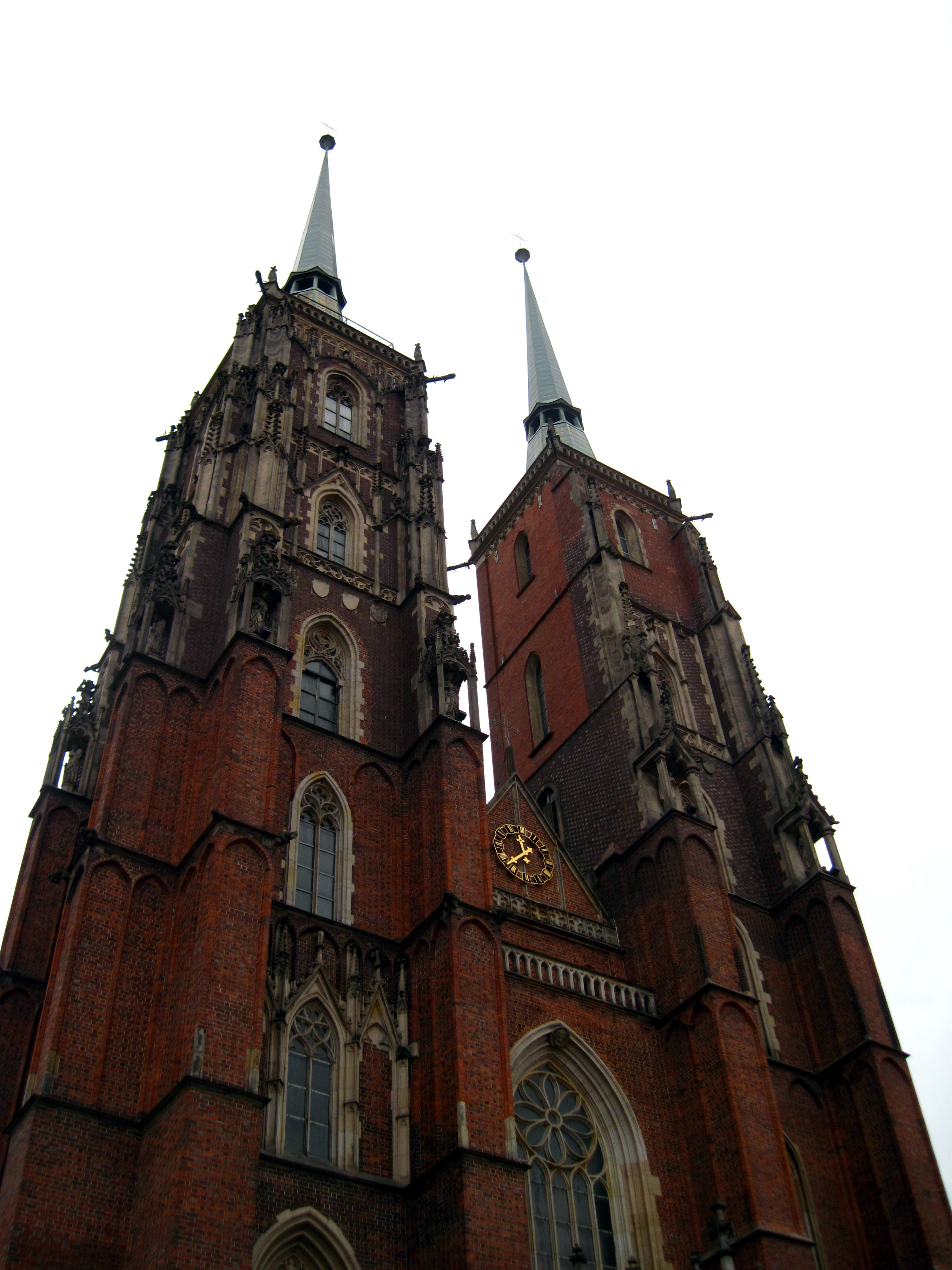 Wrocław, katedra p.w. św. Jana Chrzciciela, 1244-1272, XIV/XV, XIX, po 1945